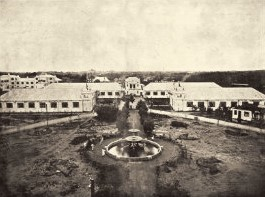 中文（中国大陆）: 南洋劝业会正门（摄于1910年）